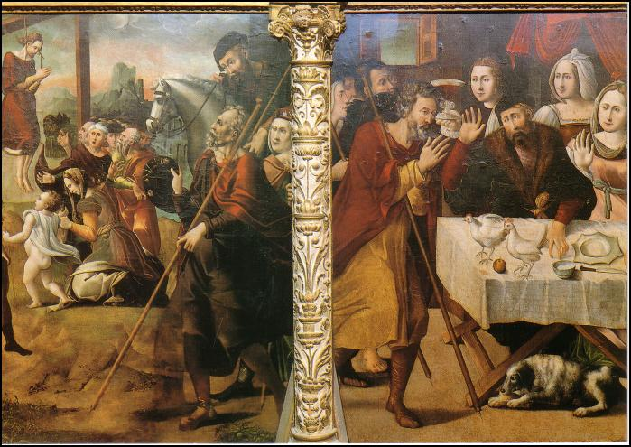 Retablo del trascoro de la catedral de Santo Domingo de la Calzada, La Rioja. Historias de la leyenda de Santo Domingo.